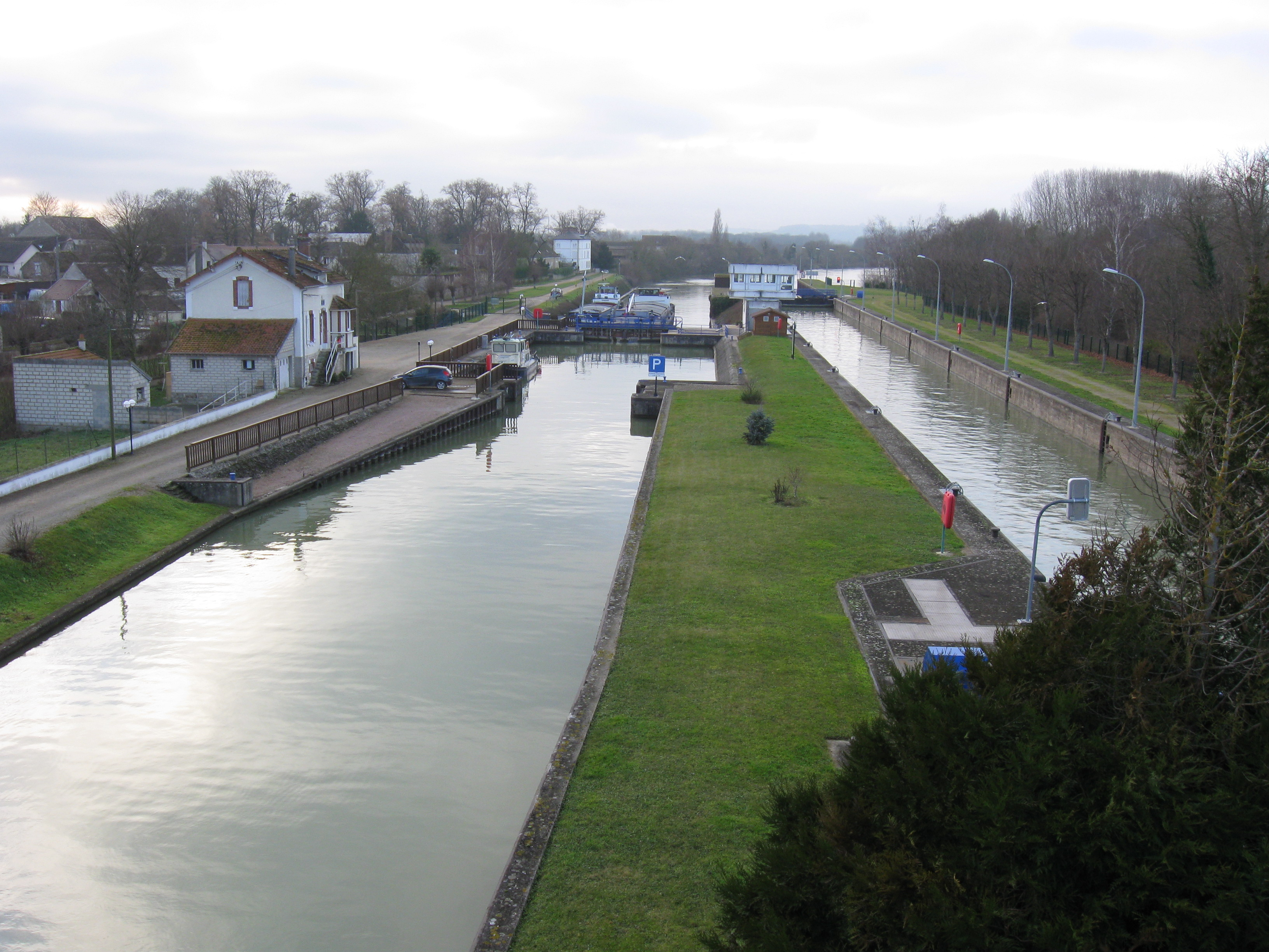 Écluse de Marolles-sur-Seine sur la Seine. (Seine-et-Marne, région Île-de-France).